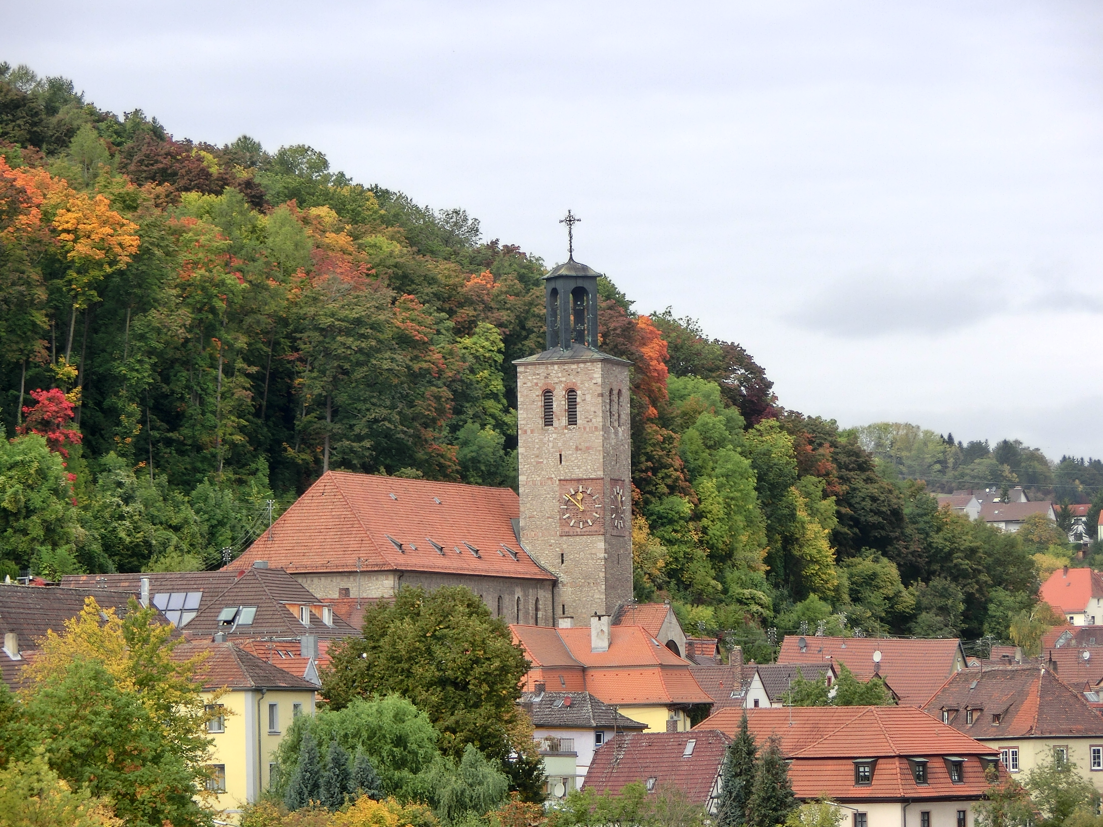 Zell am Main, Laurentiuskirche von der Laurentiusbrücke aus This is a photograph of an architectural monument.